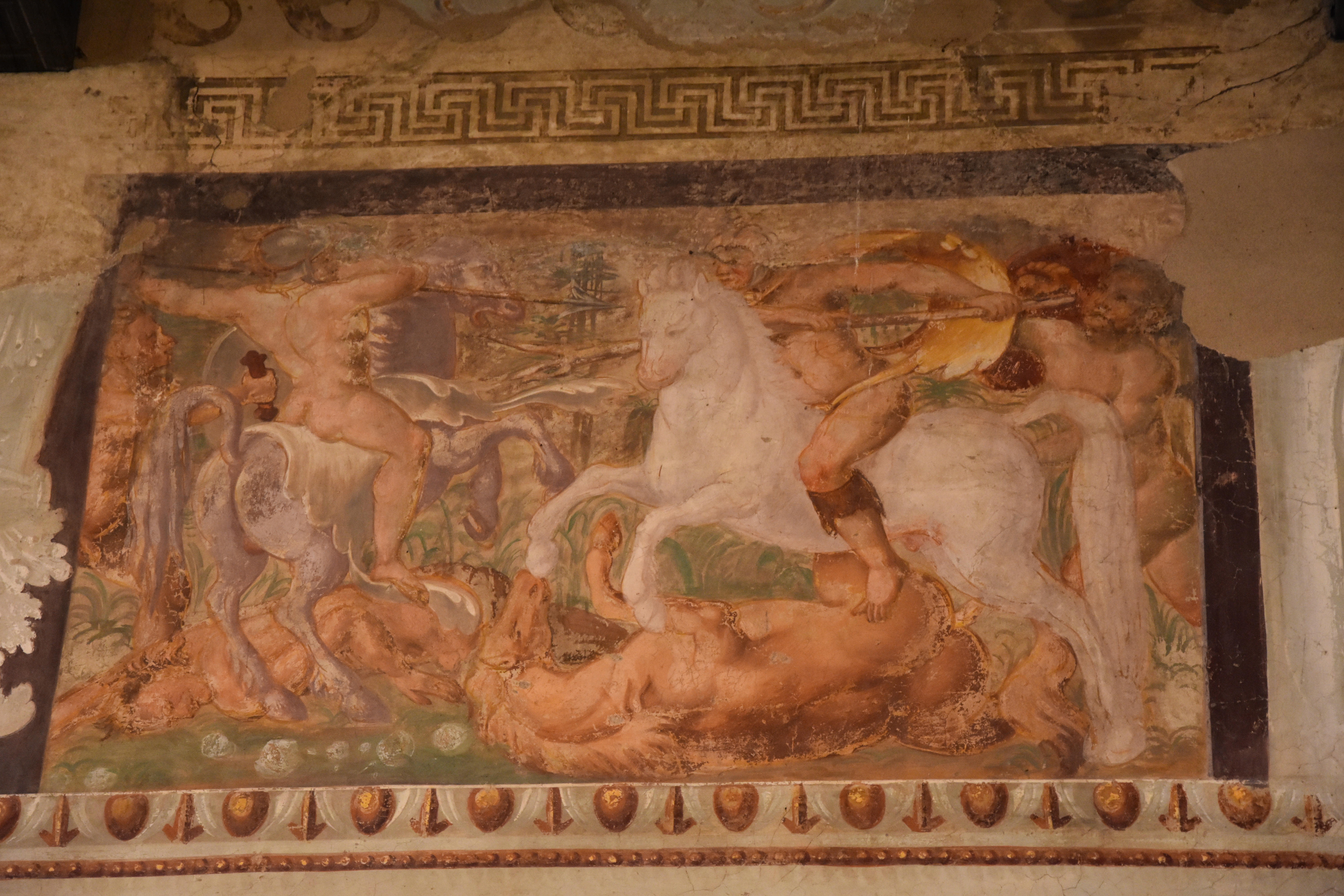 Castello di Melegnano, sala degli Argonauti, affreschi cinquecenteschi.